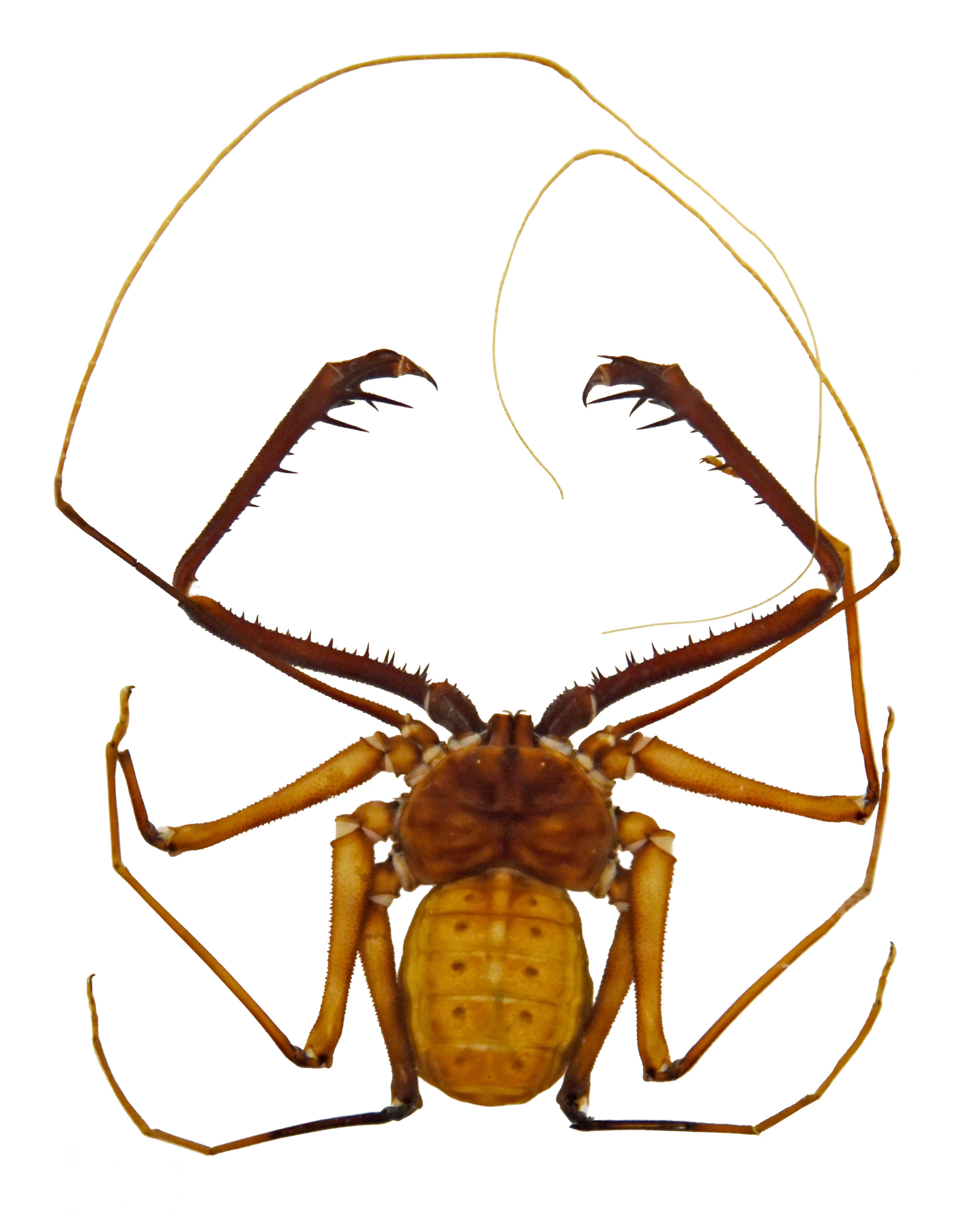 Damon medius im Naturhistorischen Museum Basel